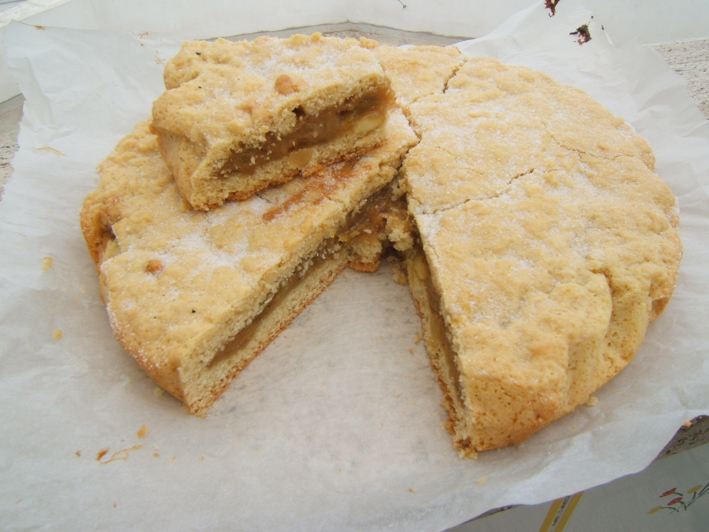 Torta pasticciotto con ripieno mandorle fichi